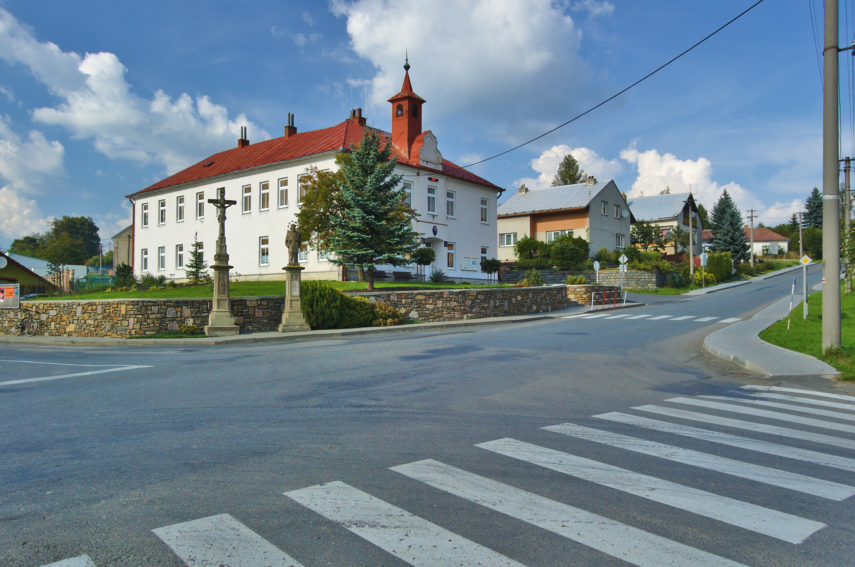 Obecní úřad, Otinoves, okres Prostějov